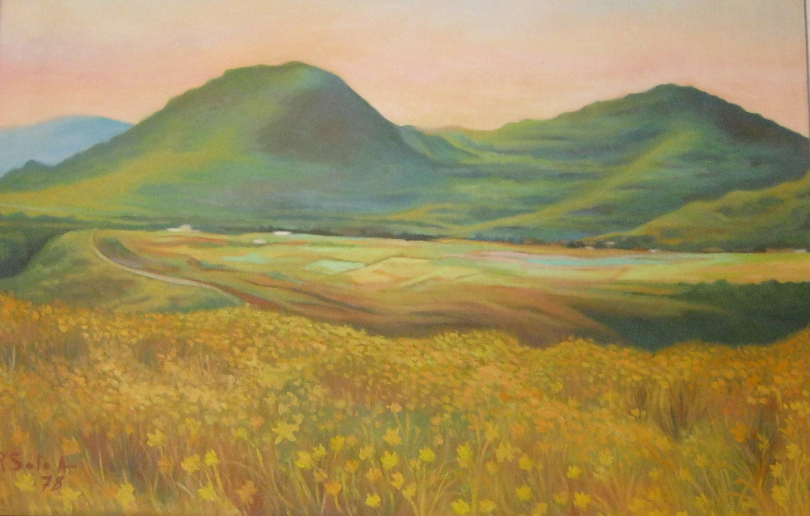 Flores amarillas pintado en 1978